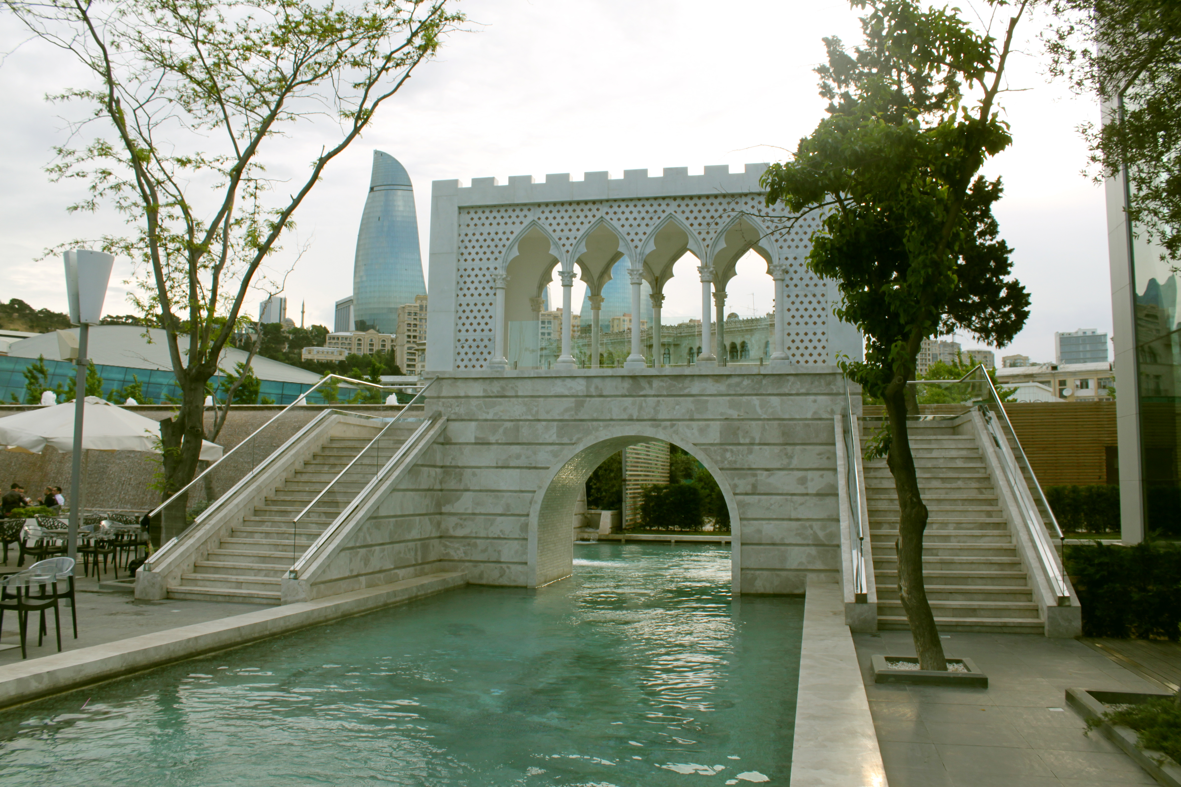 Bakı Venesiyası